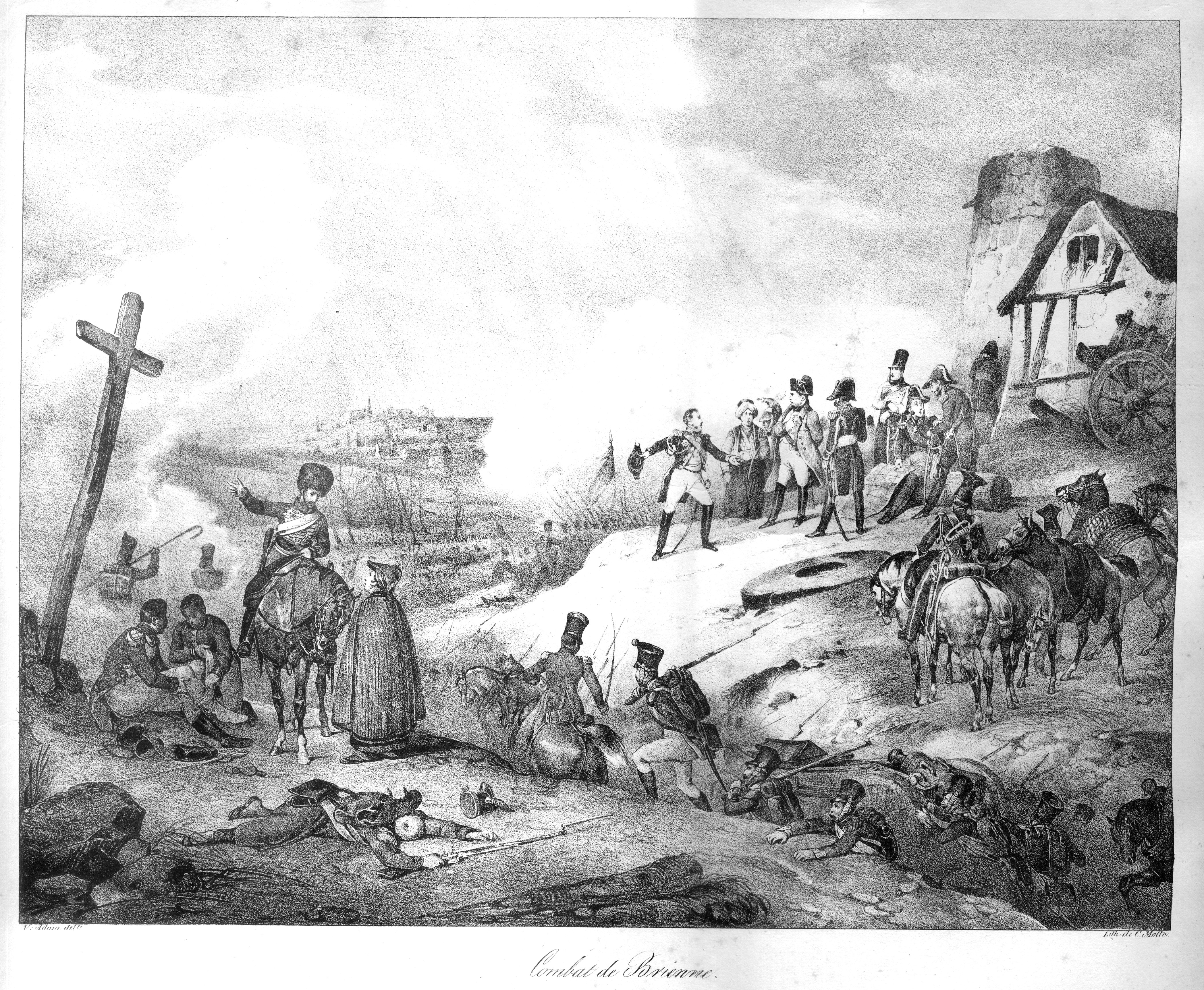 Skan litografii Jean Baptiste Madou tytuł: Combat de Brienne